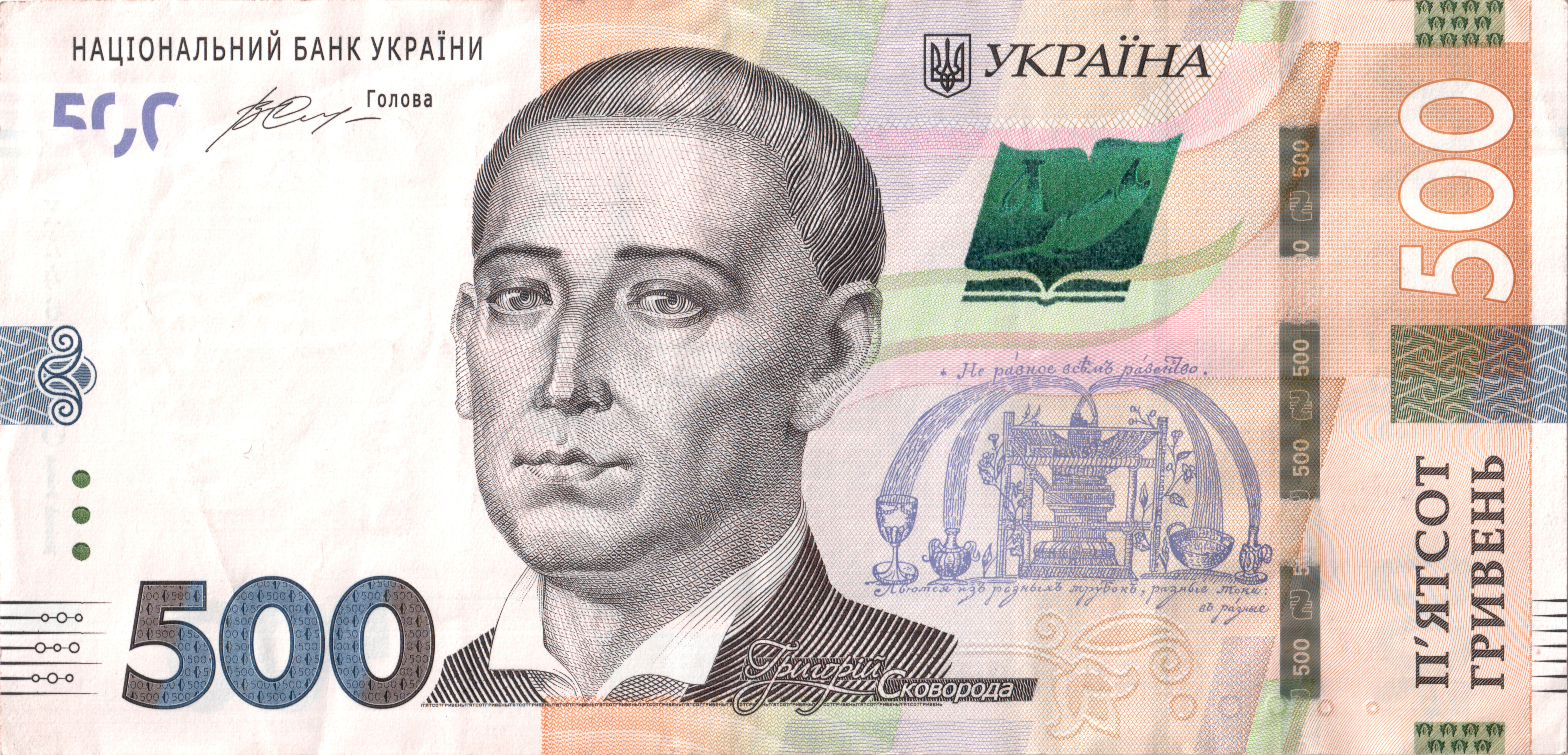 500 гривень 2015 року (новий зразок) аверс